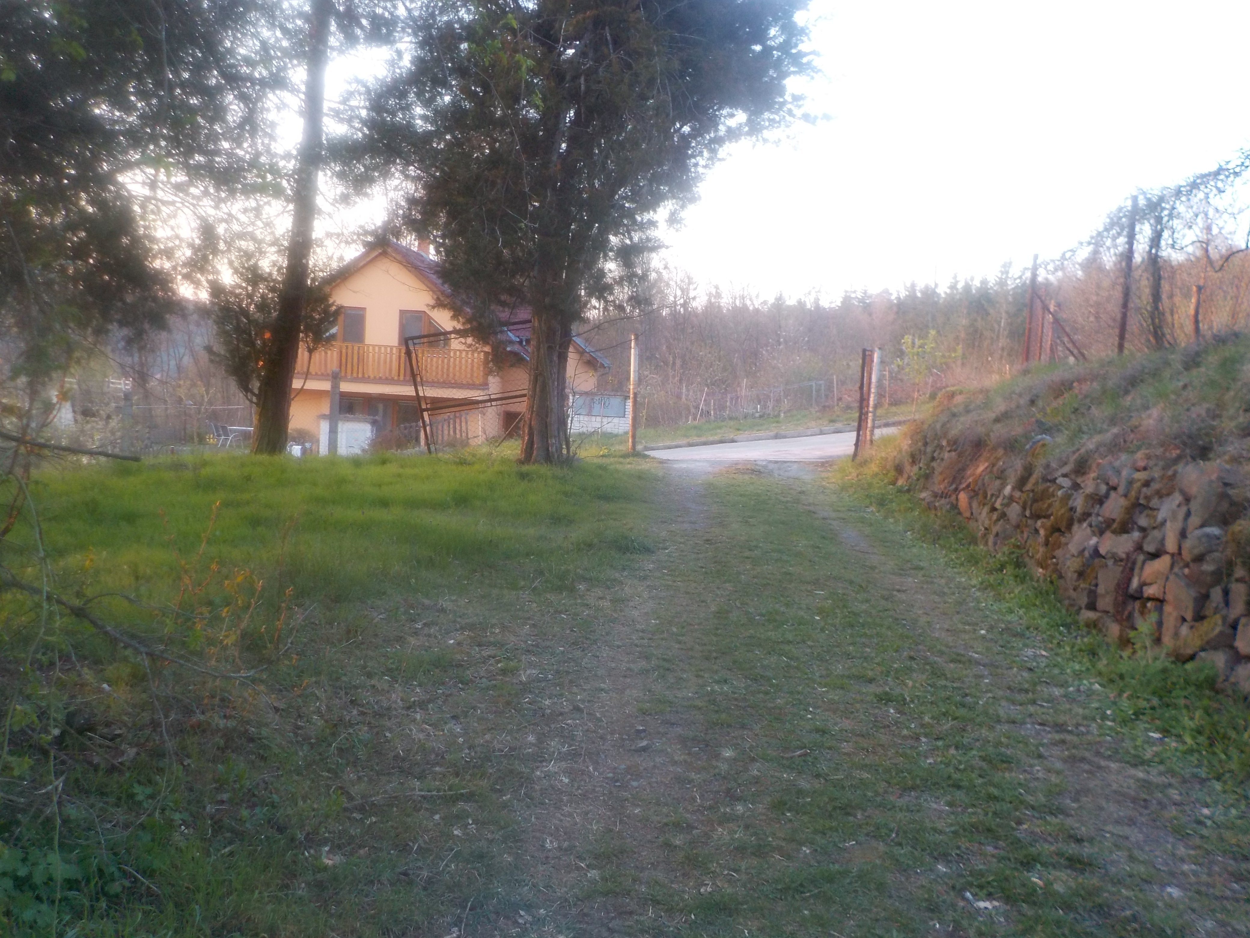 Zde měla podle zavrženého projektu z roku 1911 o prodloužení železniční dráhy z Líšně do Jedovnic stát železniční stanice Křtiny.